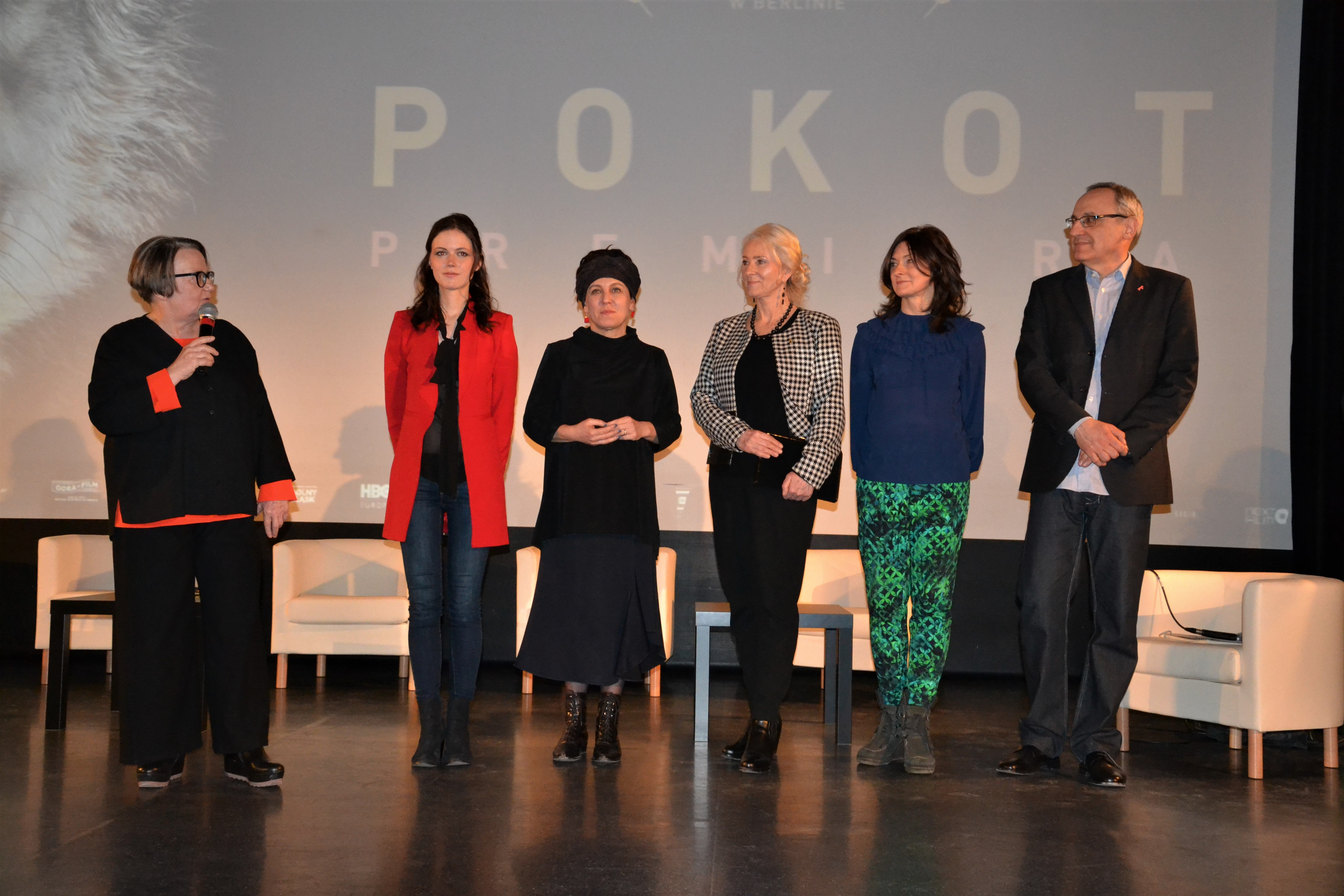 Premiera filmu Pokot w Nowej Rudzie